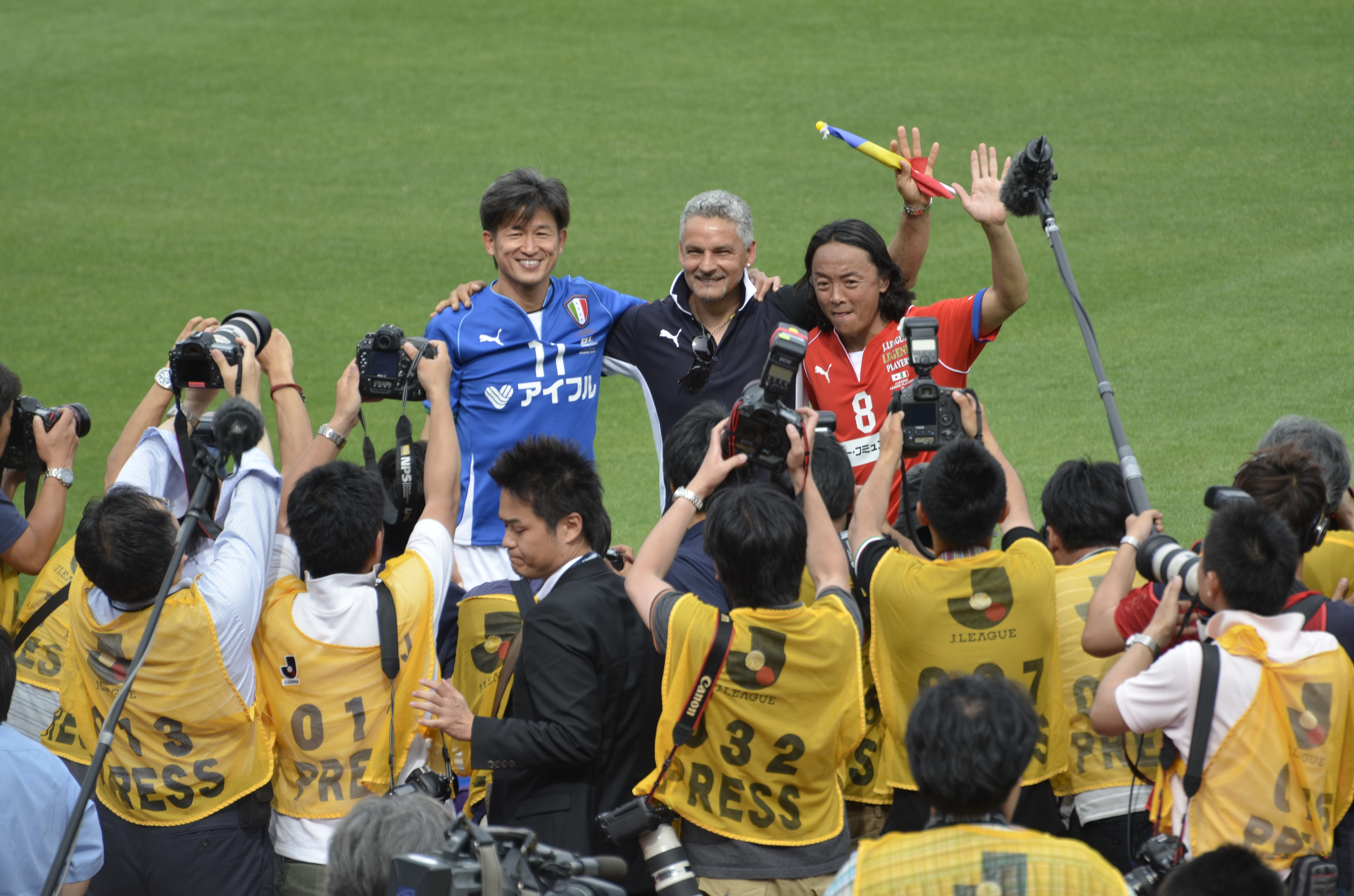 サッカー日本・イタリアOB戦